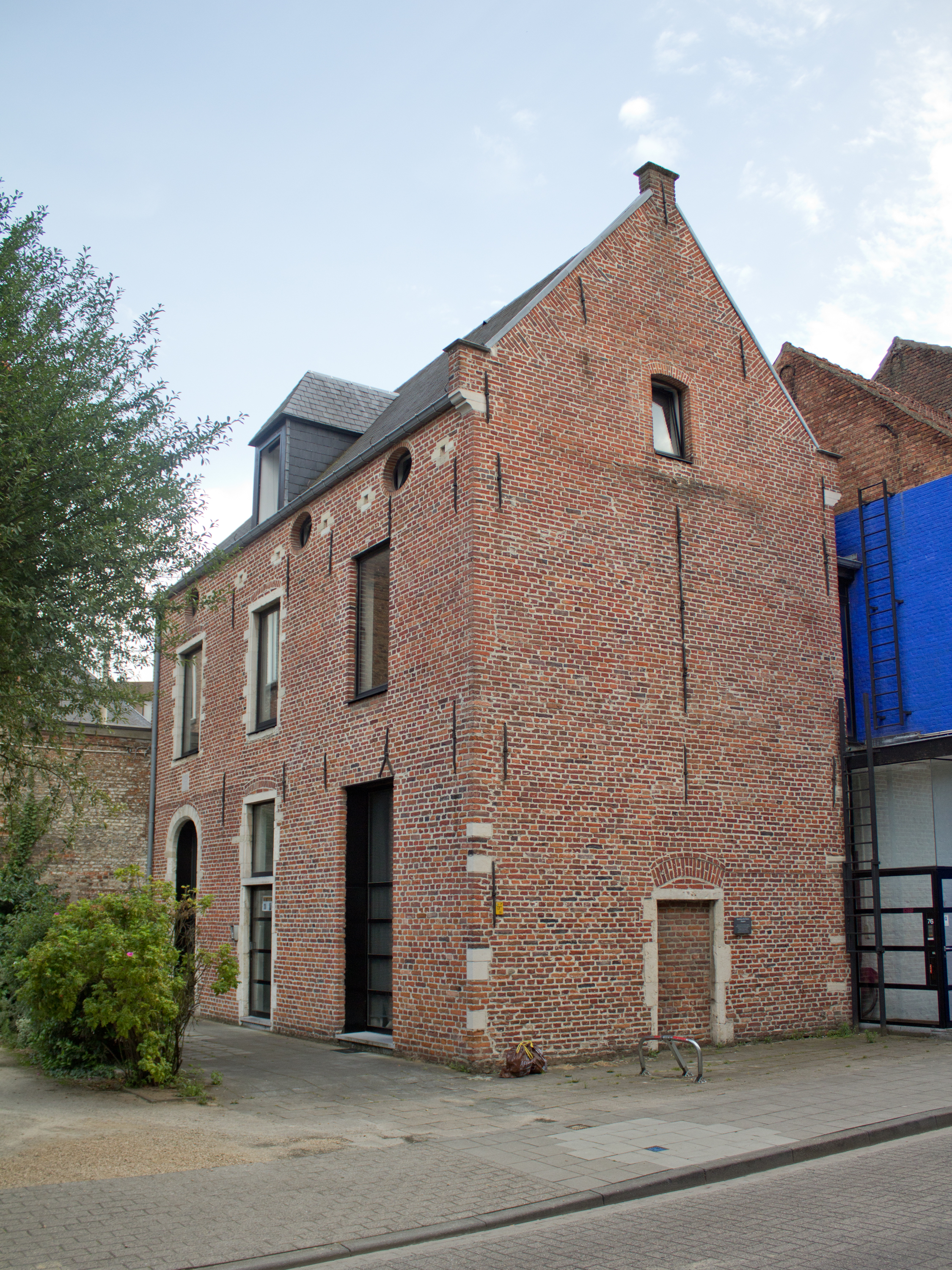 Godshuis de Zevenslapers. Pieter Coutereelstraat 76, Leuven